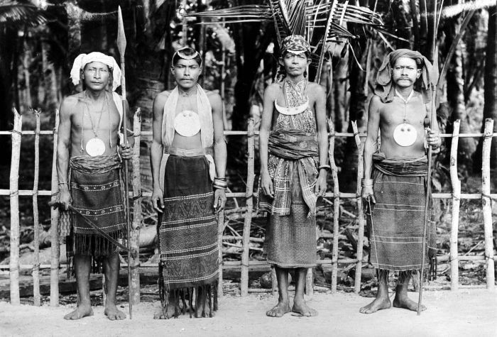 Repronegatief. Bewoners van het dorp Kisar